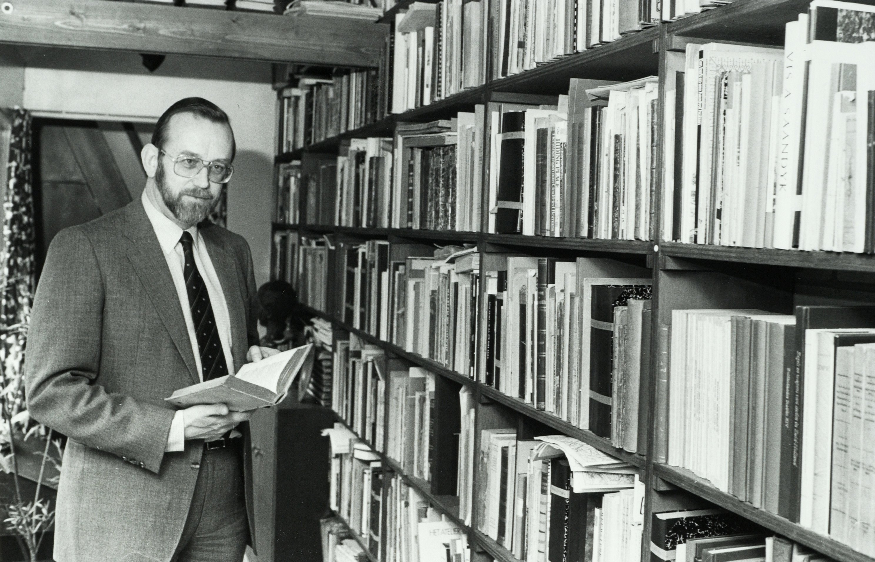 CollectieCollectie Fotoburo de BoerInventarisnummerNL-HlmNHA_54046093 Fotonummer54-0046093DocumenttypePortrettenVervaardigerBoer, Cees de (1918-1985) Soort vervaardigerFotograaf AnnotatiesAb G. van der Steur, geb. 1938. Bestuurslid van de Vereniging Haerlem. Eigenaar van de Herenmodezaak aan de Kruisstraat 7, tevens van Historisch Antiquariaat A.G.van der Steur te Haarlem.PersonenSteur, Ab G.van der LandNederland ProvincieNoord-Holland GemeenteHaarlem PlaatsHaarlem Begindatum1982Einddatum1982TechniekFoto PlaatsingKennemer Atlas-pv23